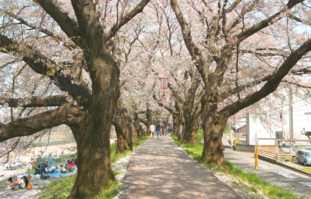 Sakura in Asuwa, Fukui, Japan.